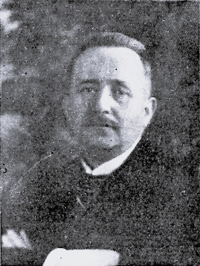 Professor Dr. Georg Rosenthal